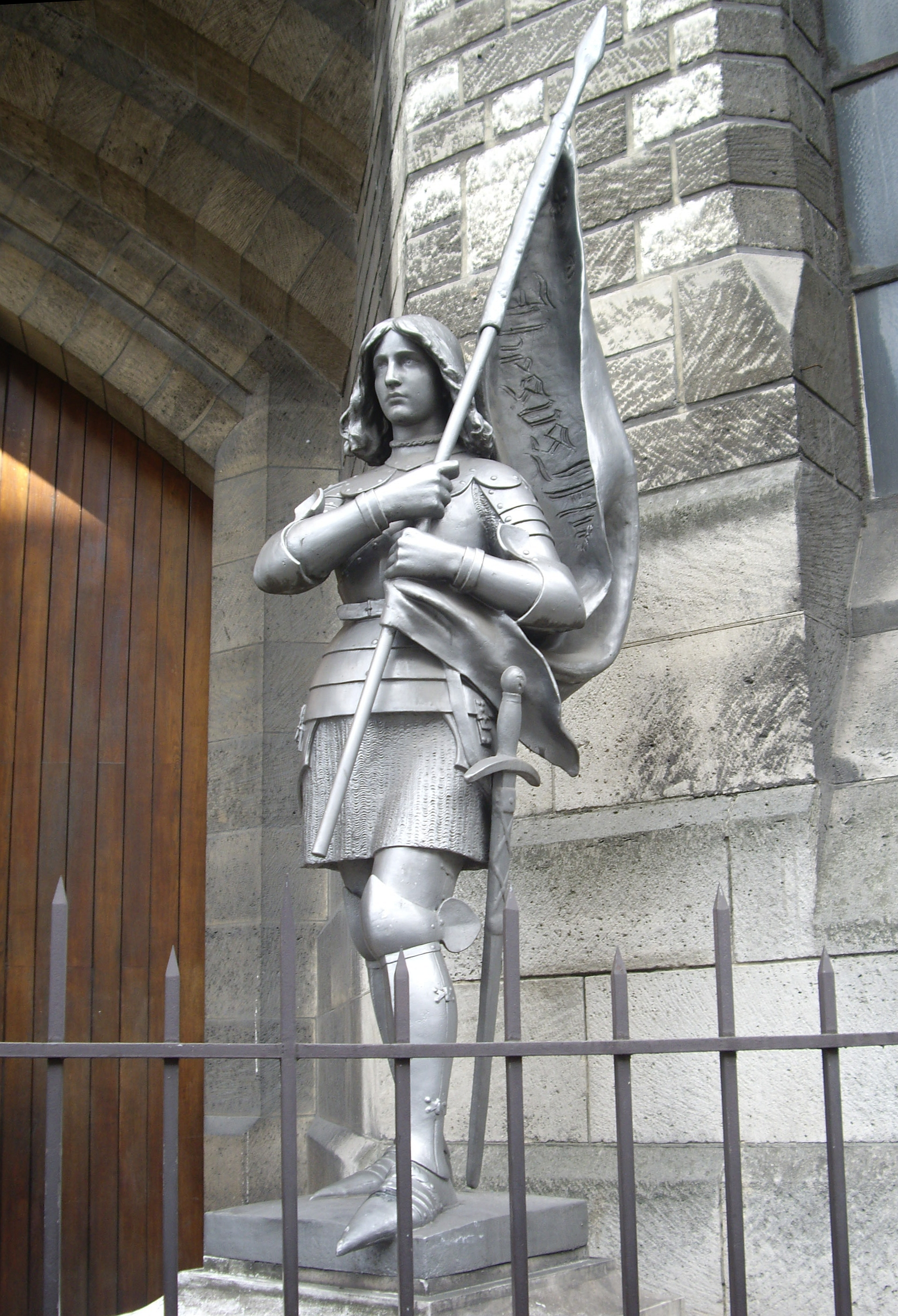 Statue de Jeanne d'Arc à l’étendard (1888) par Félix Charpentier (1858-1924) devant la basilique Sainte-Jeanne-d'Arc, Paris 18e. La statue se trouvait autrefois devant l'église Saint-Denys de la Chapelle, qui jouxte la basilique dans la rue de la Chapelle.